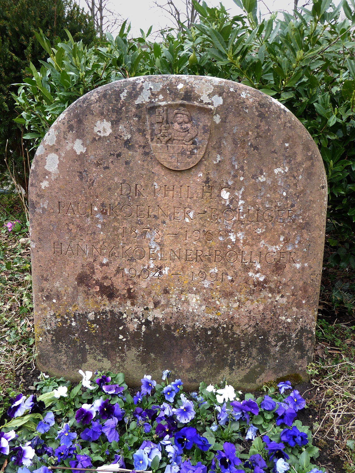 Paul Koelner-Bolliger (1878–1960) Dr.phil. h.c. Pädagoge, Historiker, Autor u.a «Basler Zunftherrlichkeit», Grab auf dem Friedhof Hörnli, Riehen, Basel-Stadt